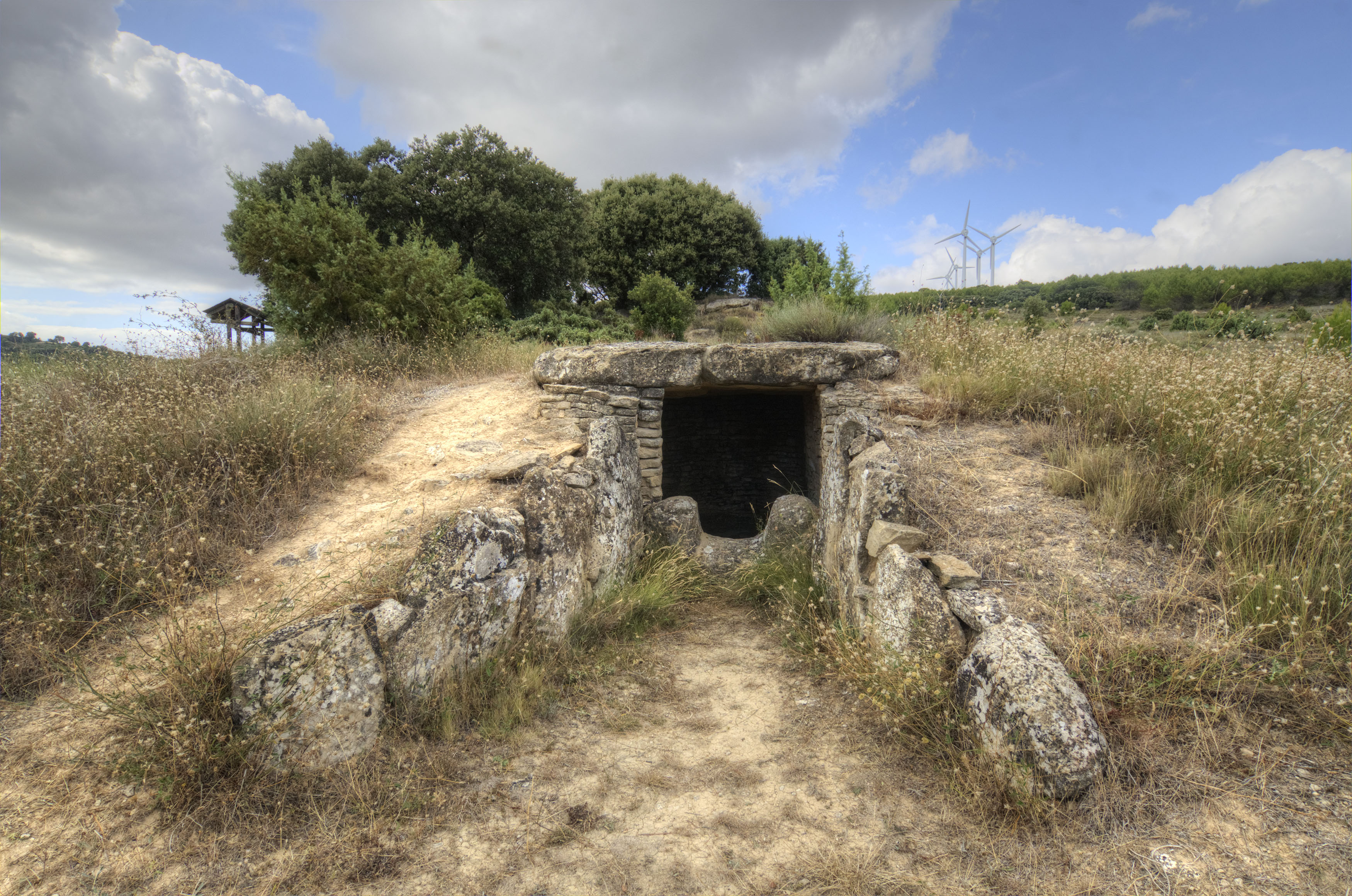 Sepulcro colectivo datado en finales del III milenio a.C. Se localizó intacto en 1989 y se excavó en los 90. Contenía de restos óseos de unas 80 personas, entre ellas cuatro con puntas de flechas clavadas. Está en las cercanías de Viana, Navarra.